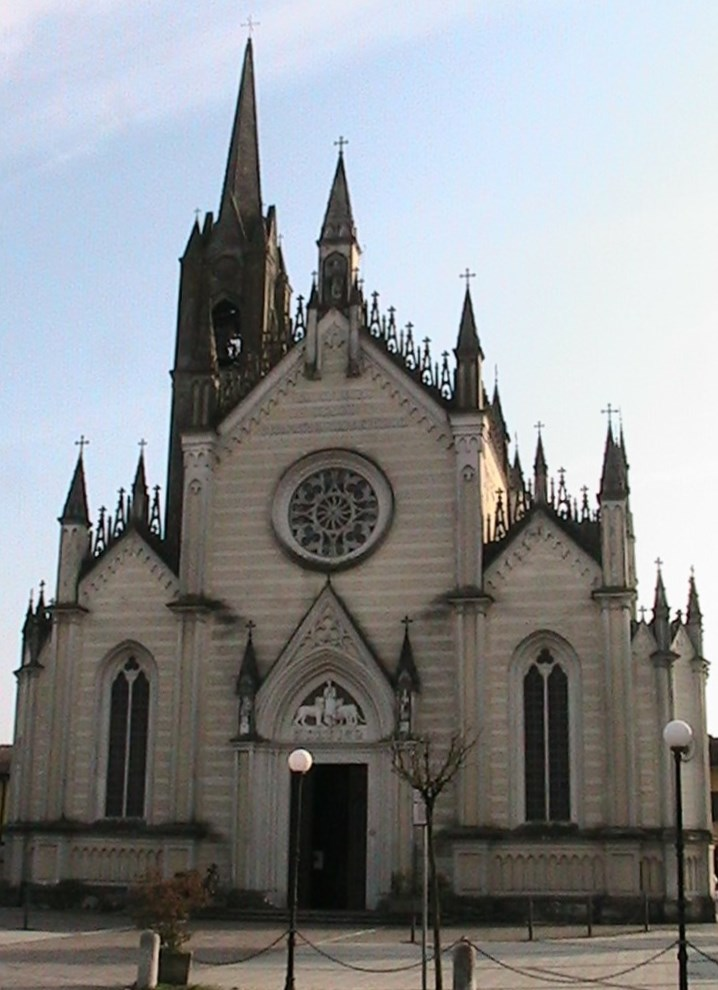 San Daniele Po - Chiesa Parrocchiale